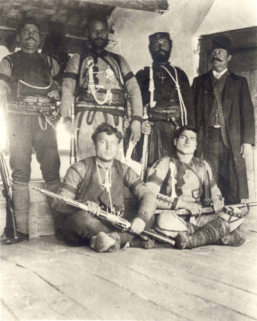 Гоно Йотов, Лазал Дояма, Апостолис Матопулос, доктор Антонаки, Кулакия, 1908.